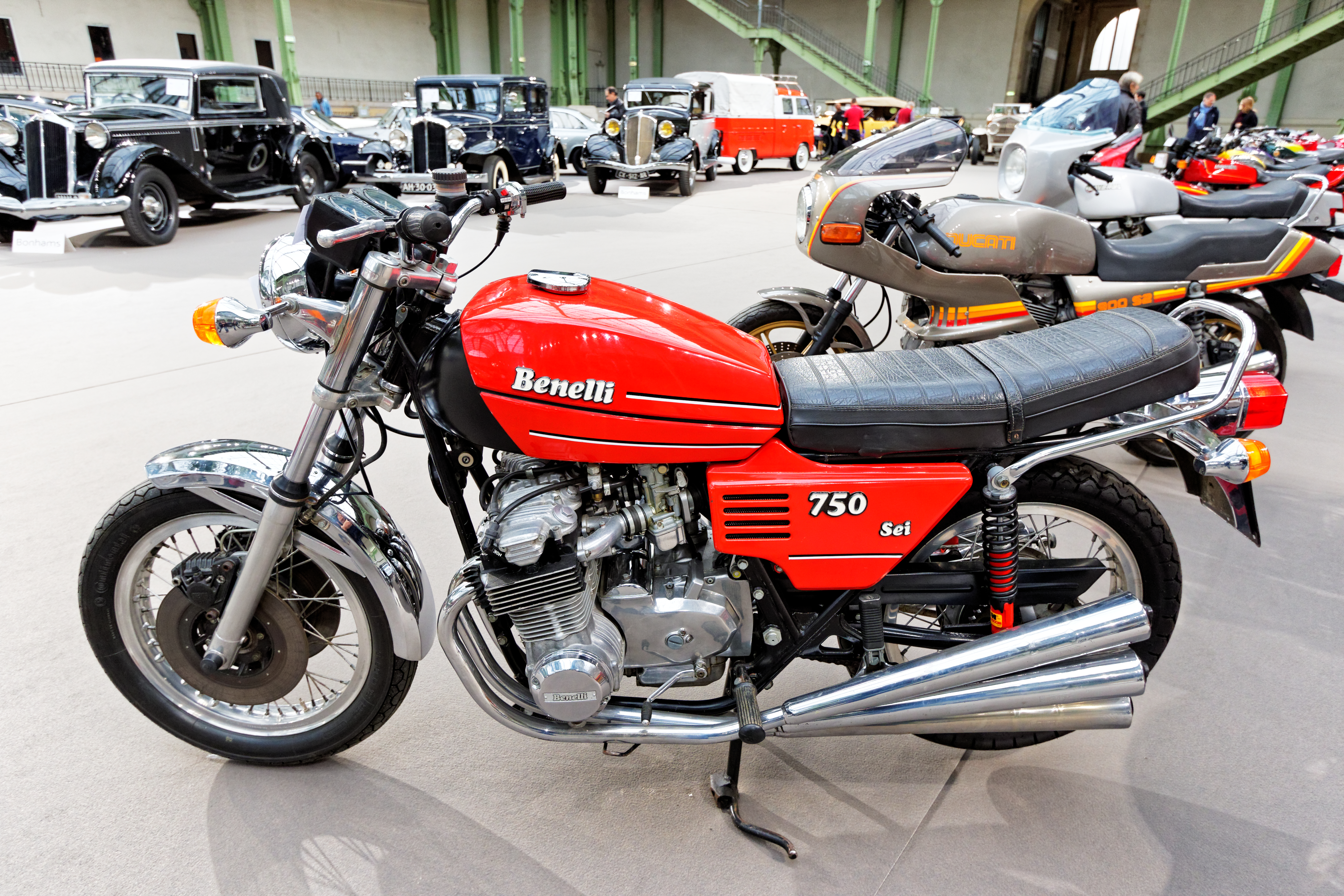 Un des véhicules présenté lors de la vente aux enchères Bonhams 2016 au Grand Palais de Paris.